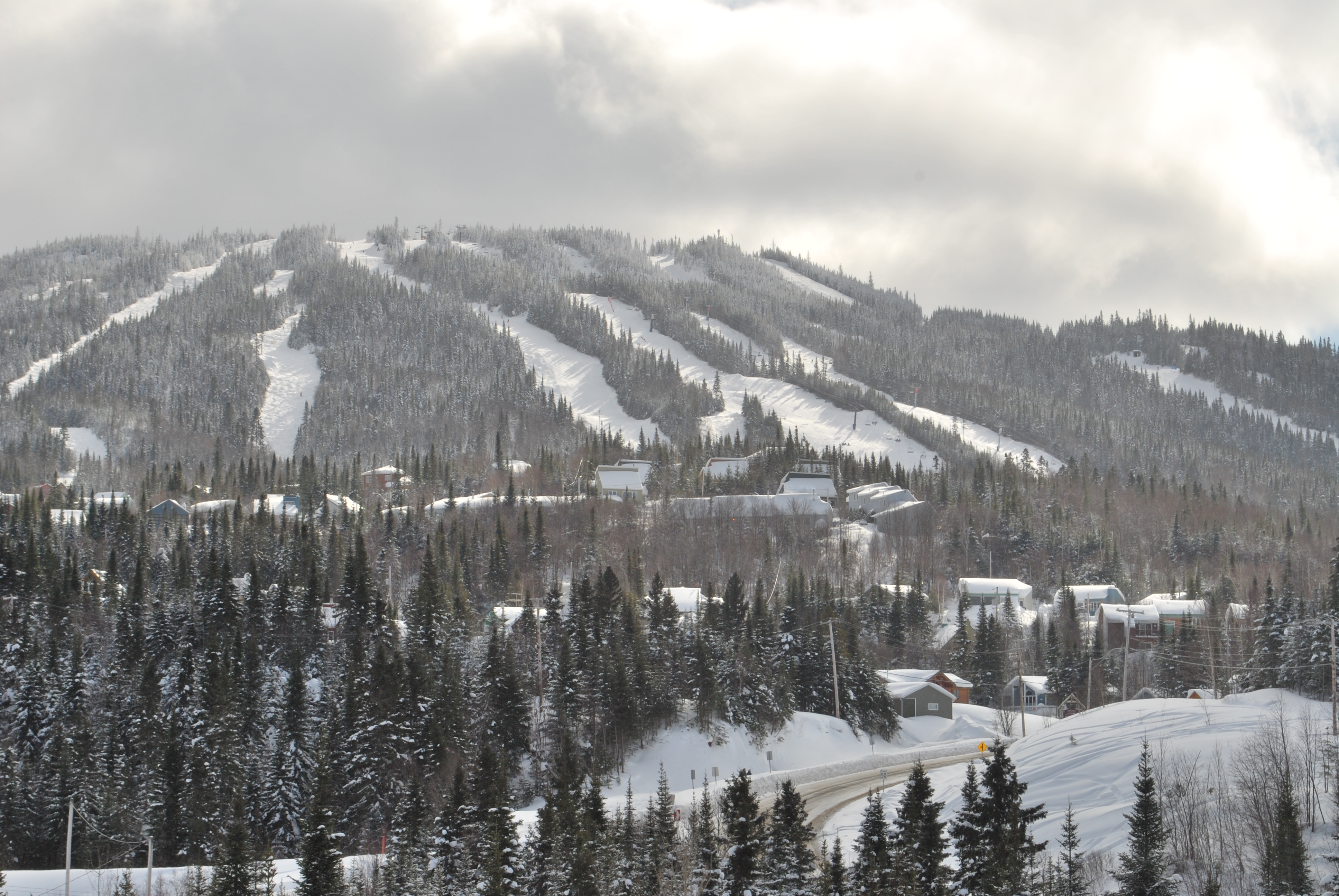 Le Valinouët